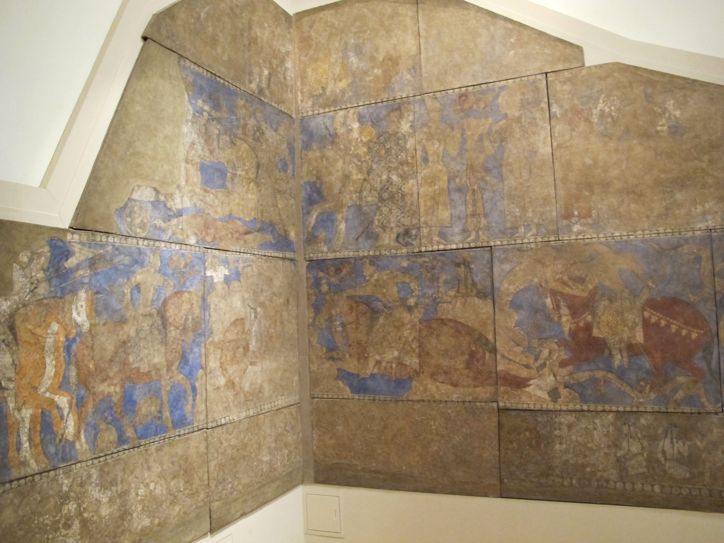 Parte della composizione a più registri della sala cerimoniale (blu), pendjikent, sett. VI, cam. 41, angolo n.o., 740 ca.